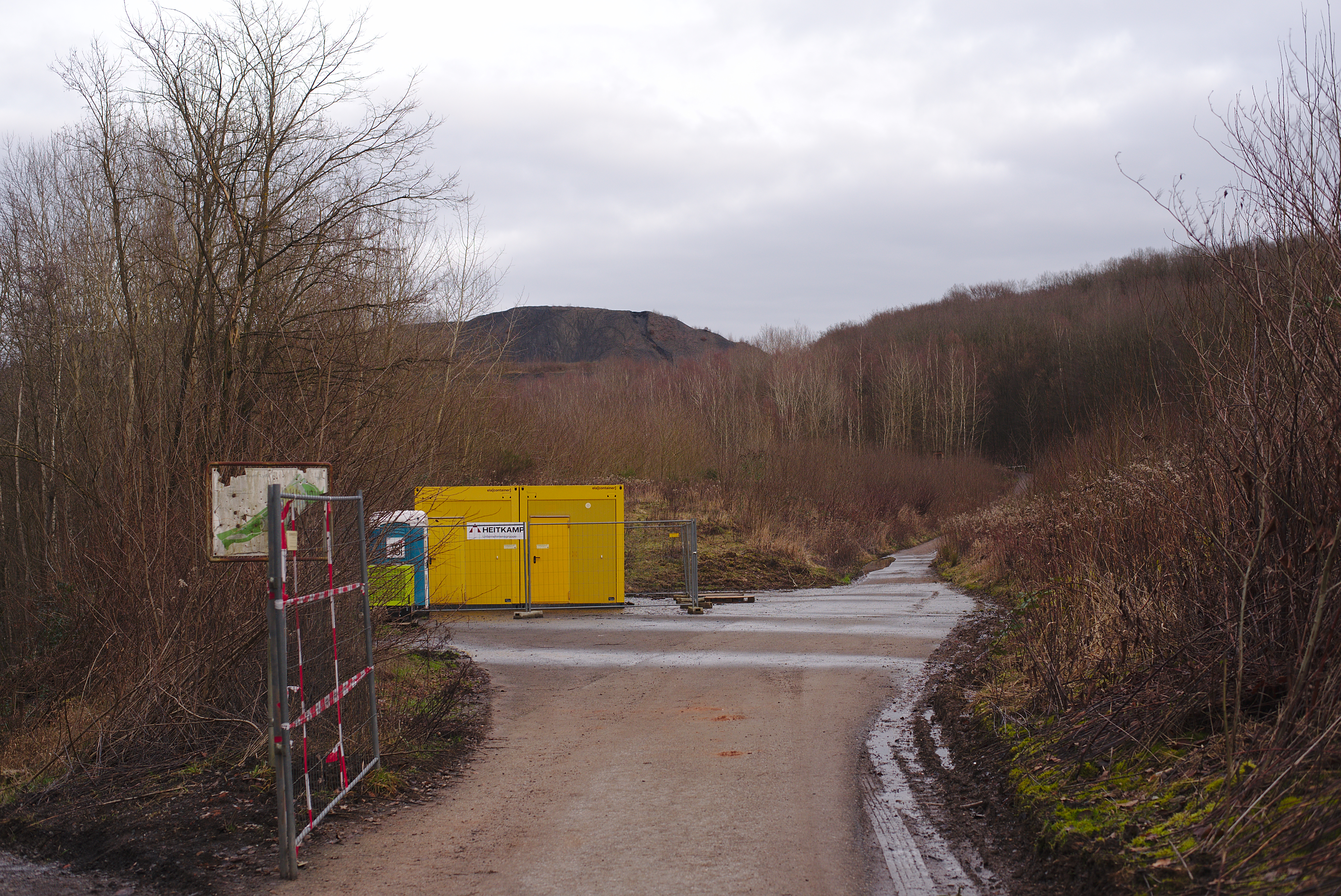 Blick von Süden auf die Halde Lydia. Im Vordergrund steht ein gelber Container und ein mobile Toilettenkabine.